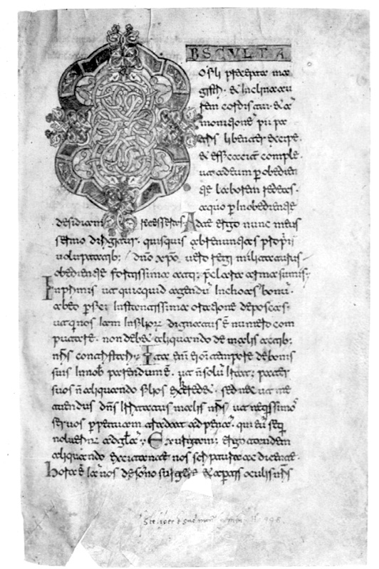 Regula Benedicti, Monte Cassino, Biblioteca dell'Abbazia, Cas. 444; dated to 1075-1090; from E. A. Lowe, Scriptura Beneventana Category:Illuminated manuscript images